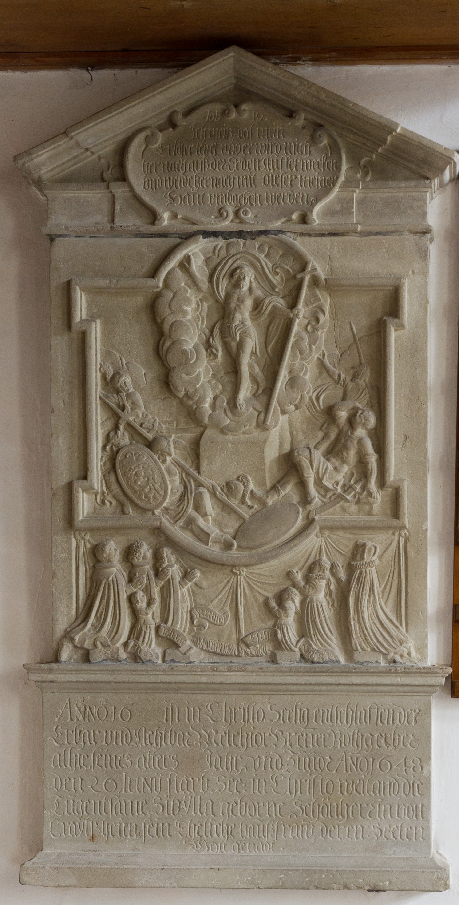 Gedenkstein in der Kirche Bächlingen